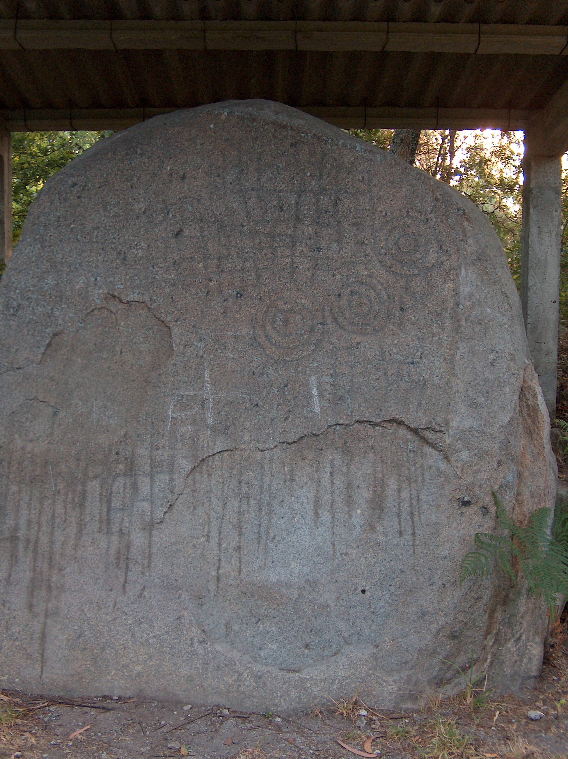 Descrição vista da Pedra escrita, em Serrazes,São Pedro do Sul em Portugal. (imagem 2) Fonte Carregada pelo autor Autor João Carvalho